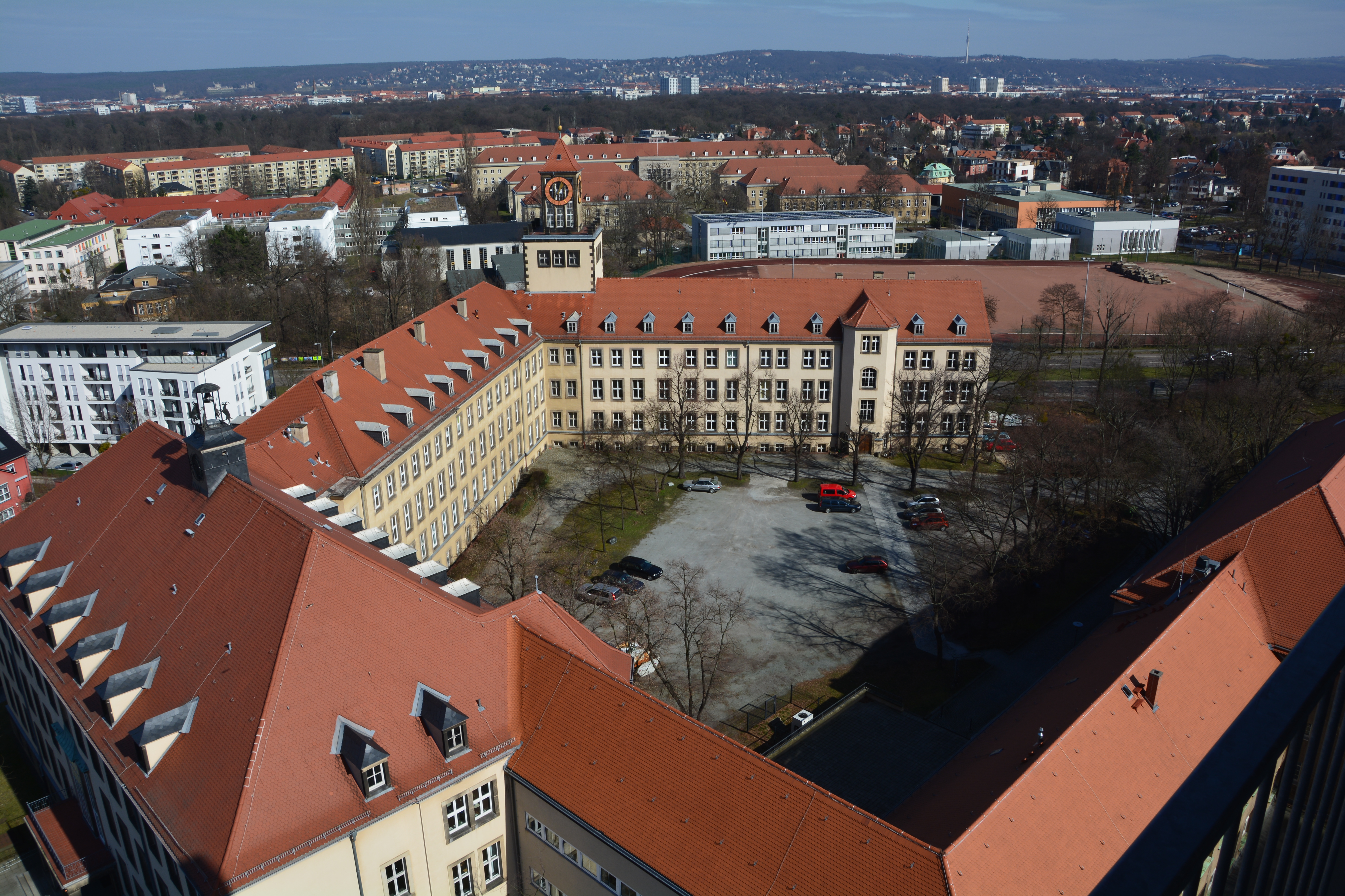 Dresden,TU-Gebäude am Weberplatz, Königliches Lehrerseminar - Arbeiter -und Bauernfakultät heute Erziehungswissenschaftliche Faklutät am Weberplatz.